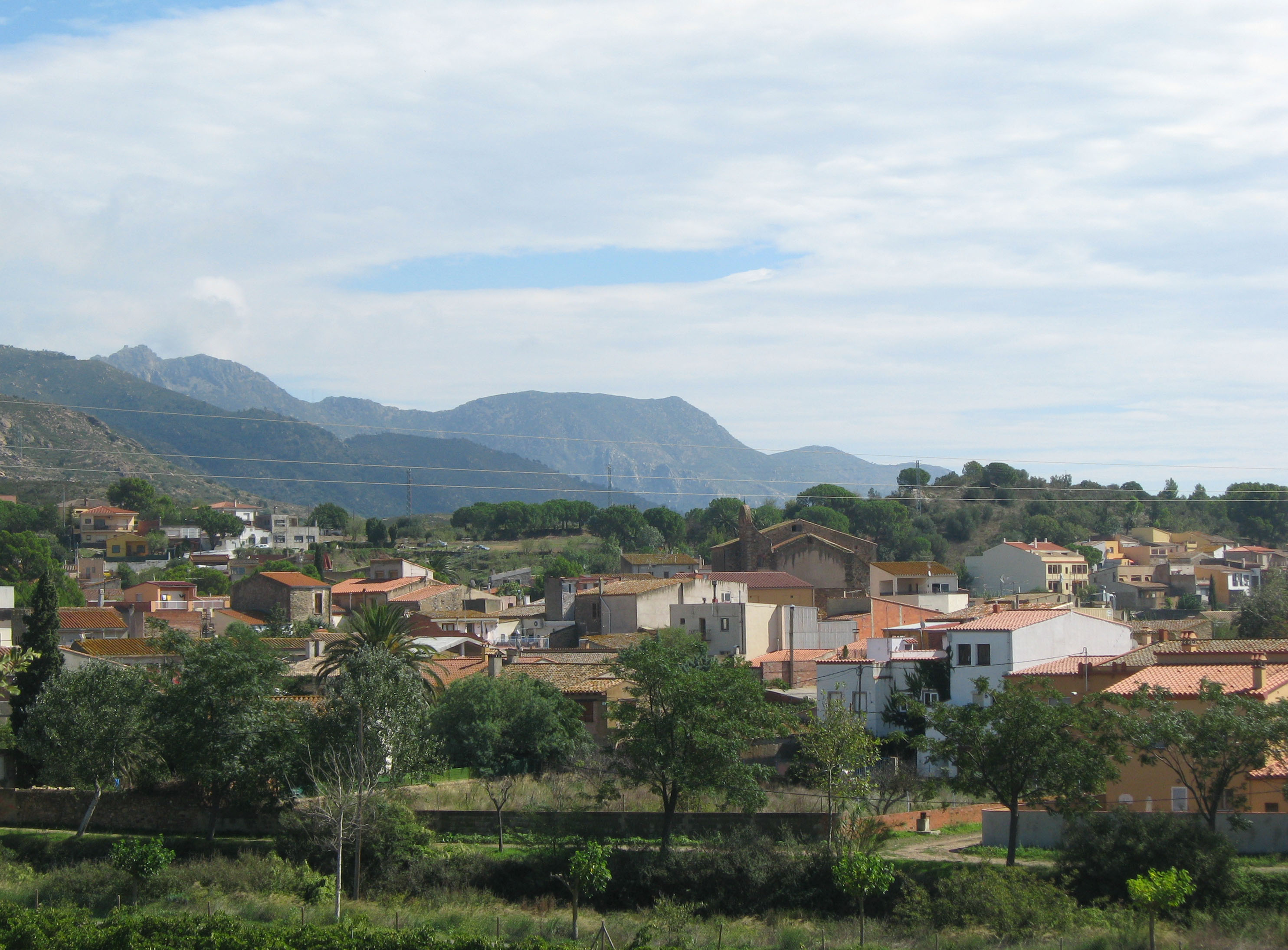 Vilajuïga (Spanien/Katalonien) Datum: 24.09.2010 Urheber: Michael Pfeiffer alias Benutzer:Gordito1869 Quelle: privates Fotoarchiv des Urhebers